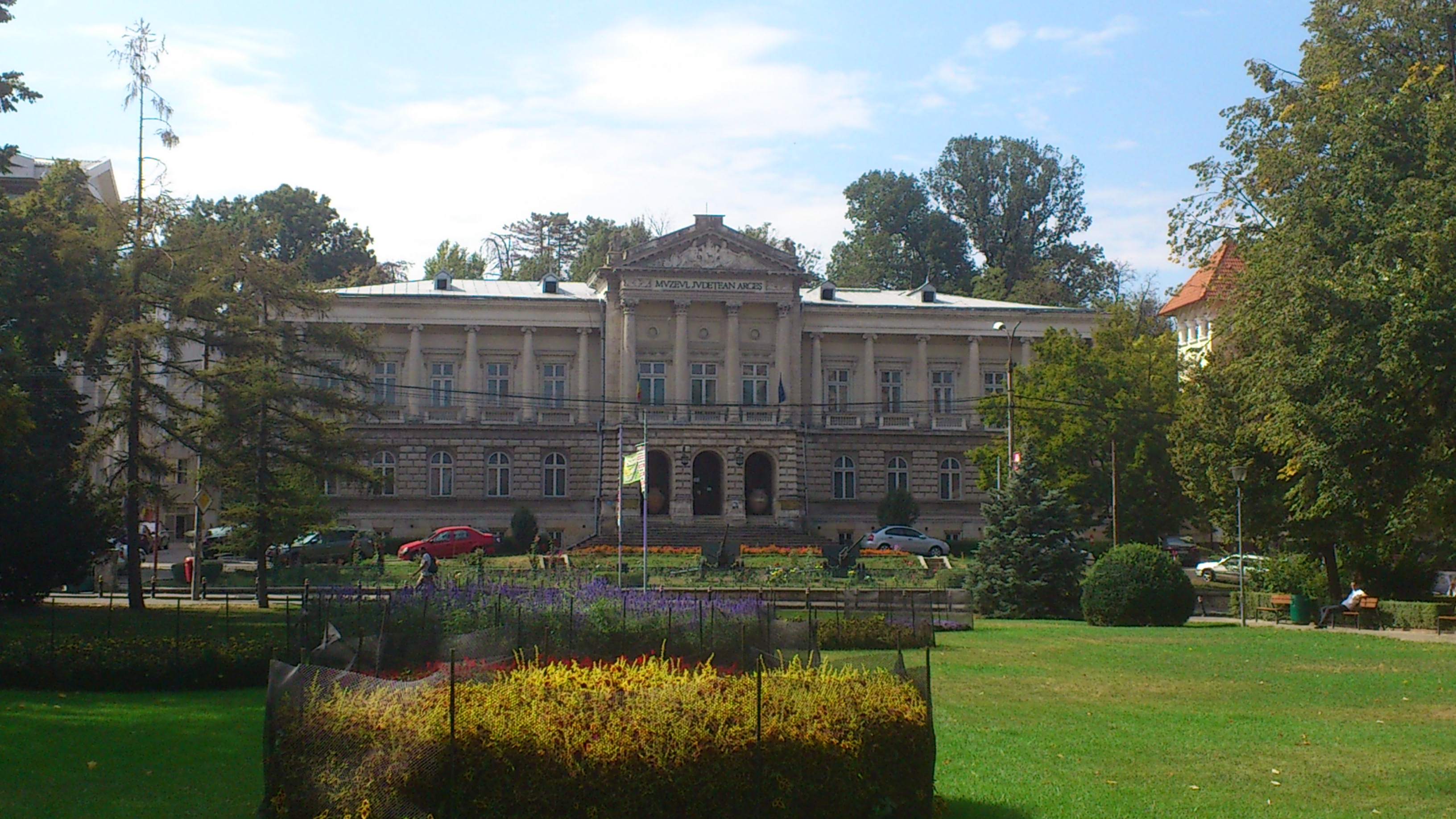 Vechea Prefectură, azi Muzeul Județean Argeș 01